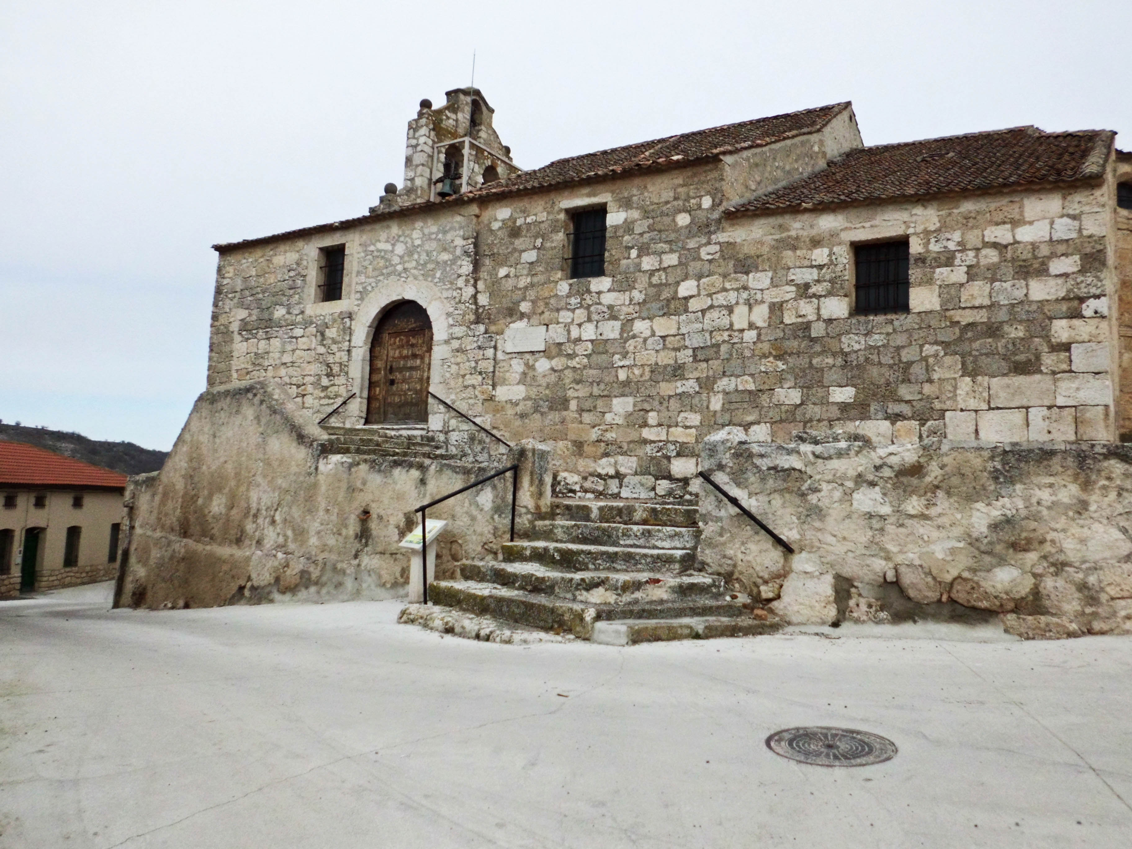 Iglesia románica de la Vera Cruz o Invención de la Cruz en la localidad segoviana de Cuevas de Provanco. Fue restaurada en 1991.